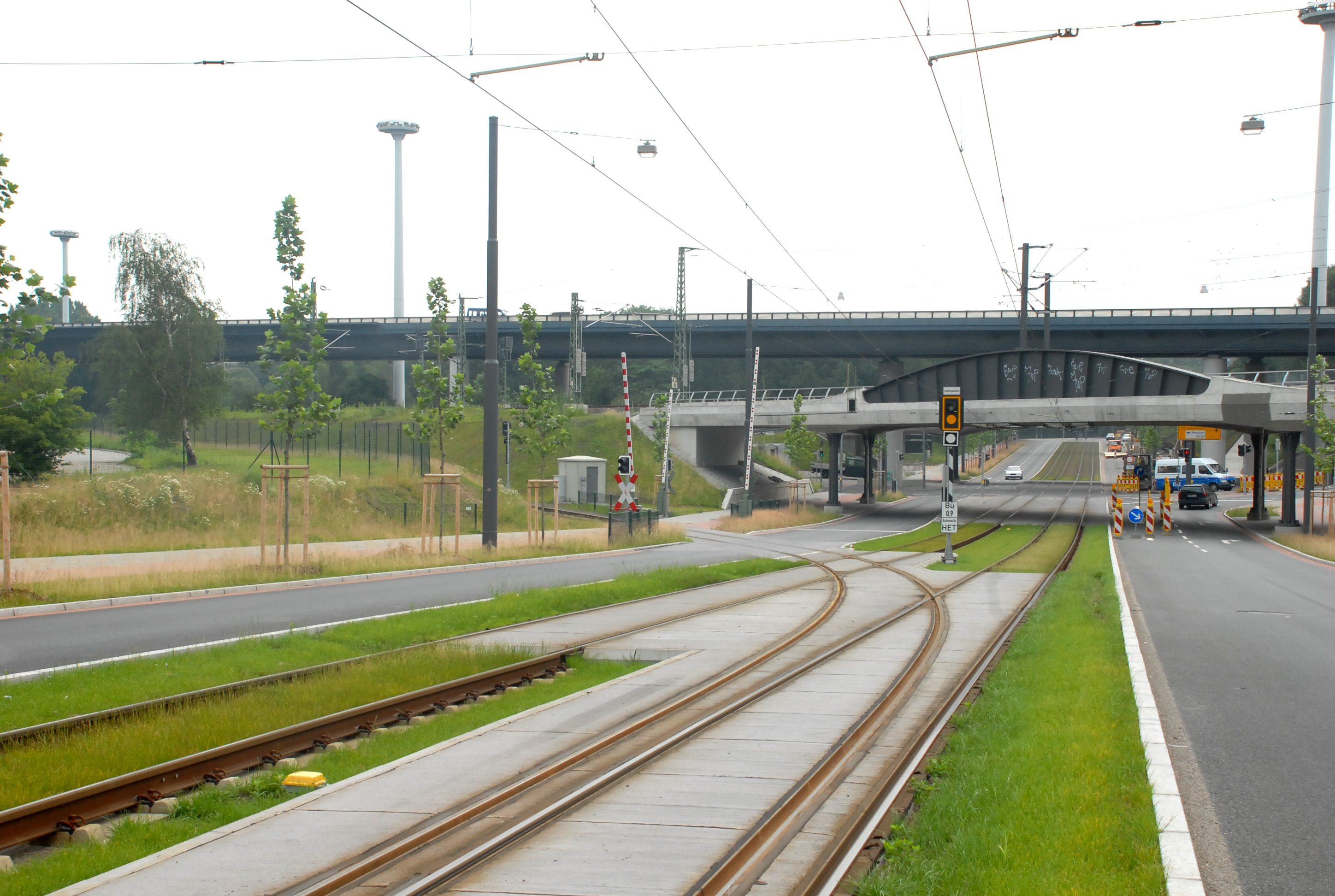 Strengelspoor in de Auf der Muggenburg. Hier loopt het goederenspoor als een strengel tussen het tramspoor te Bremen.